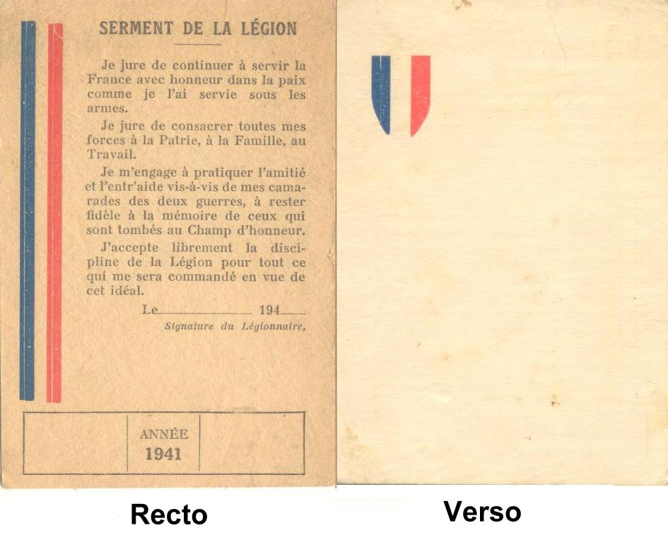 Carte portant mention du serment du légionnaire - 1941